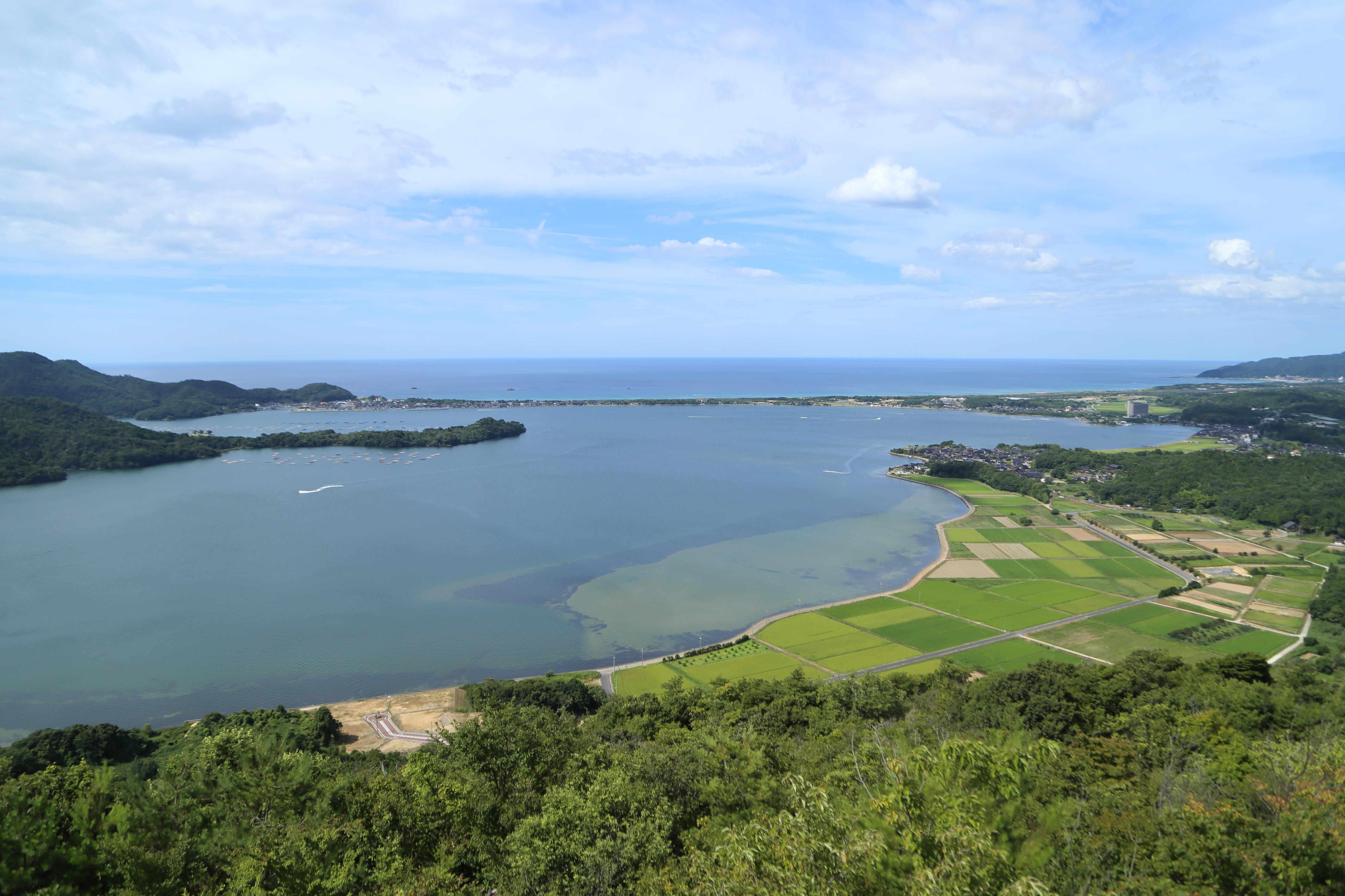 かぶと山から久美浜湾を望む。2019年8月11日撮影。